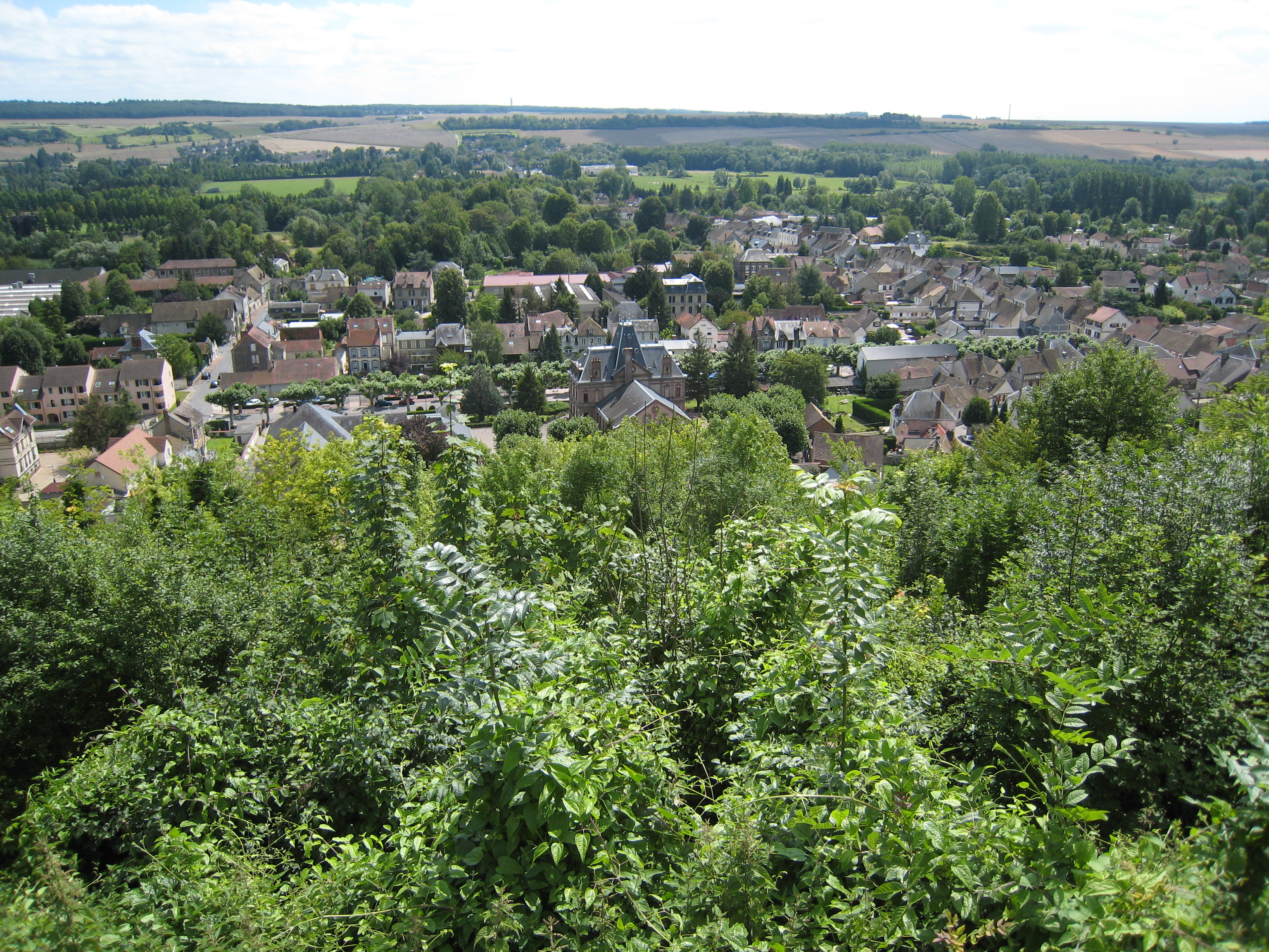 Le village vu du château.